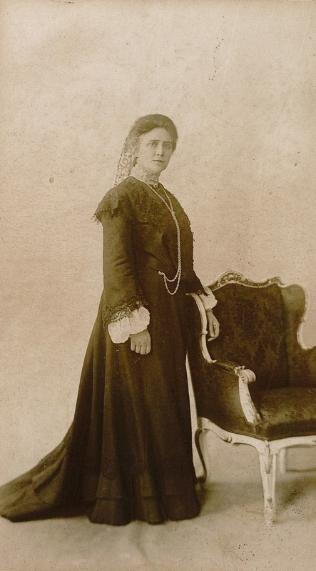 portrett, kvinne, skuespillerinne, stående knefugur, rollebilde.